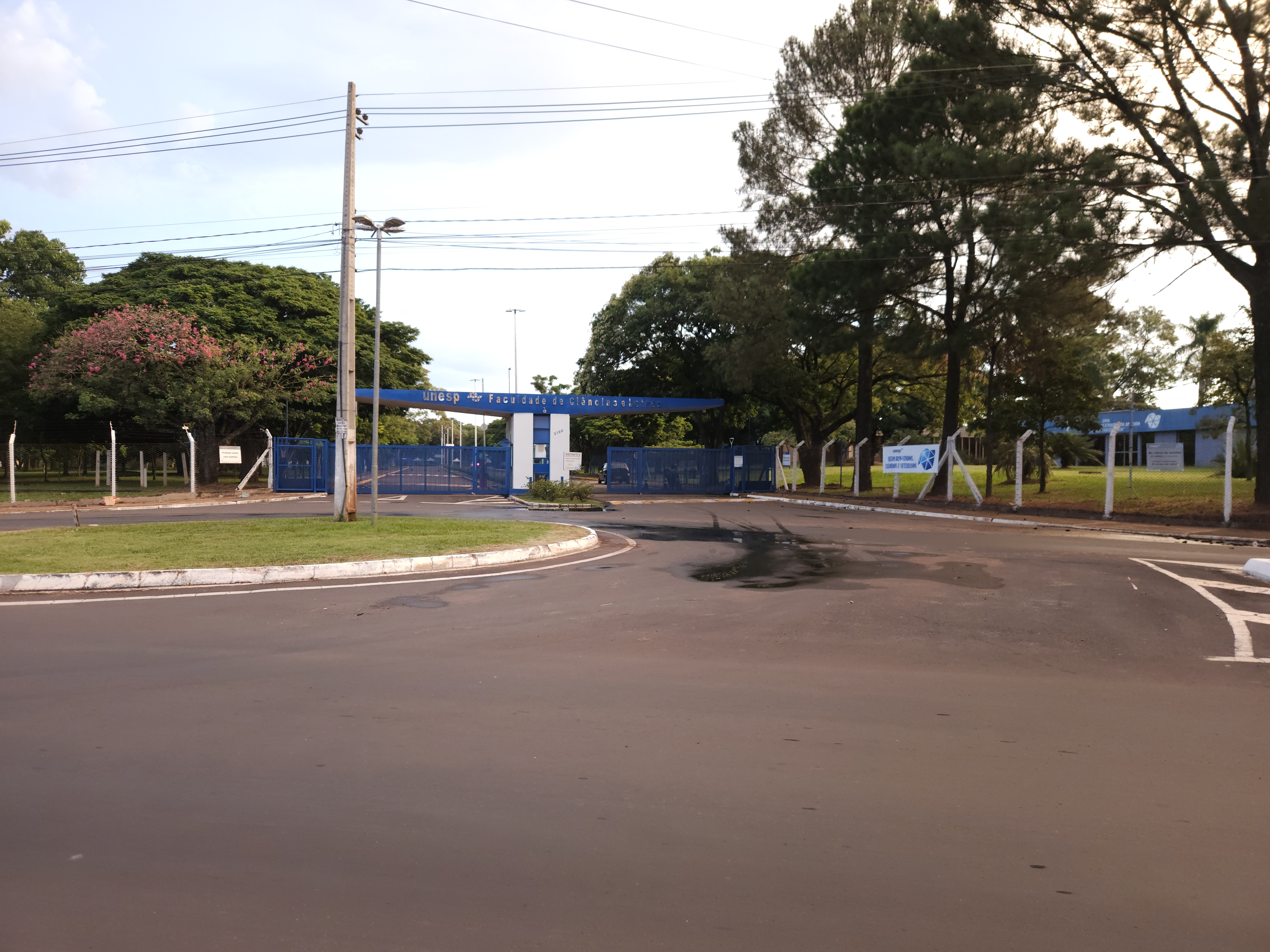 Portaria da Faculdade de Ciências e Letras de Assis